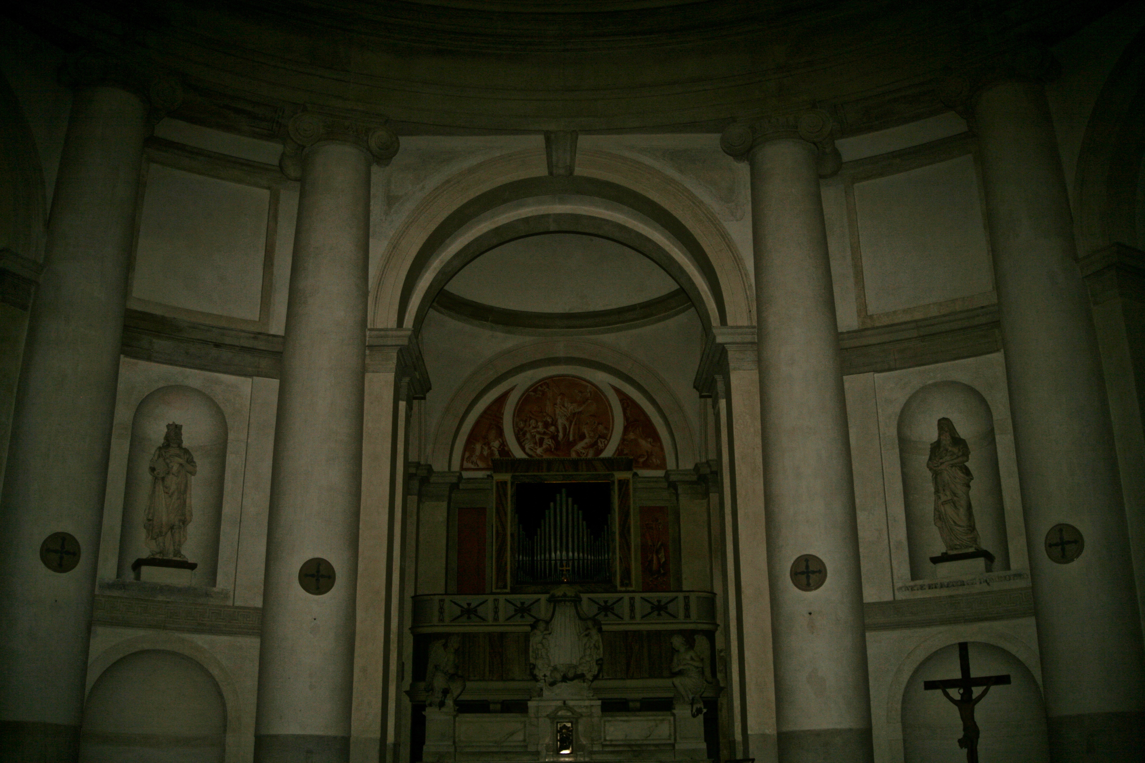 Fotografia interno della chiesa A.Liuzzi